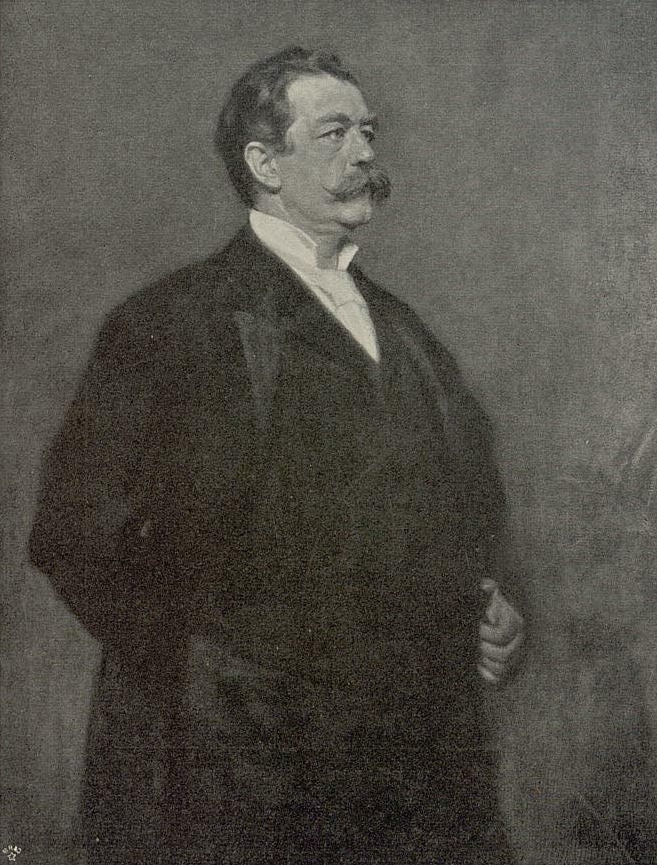 Fürst Herbert von Bismarck